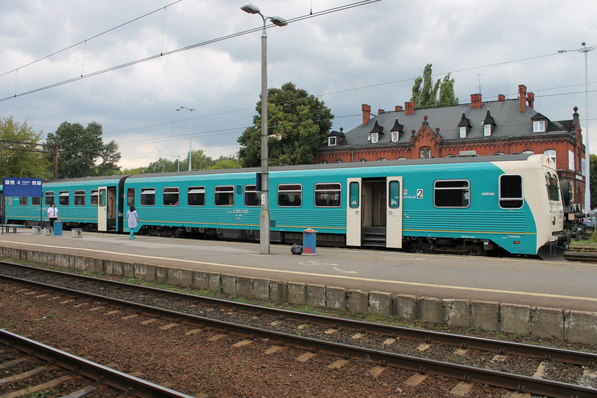 Spalinowy zespół trakcyjny MRD4255/MR4055 na stacji Toruń Główny. This photo was taken during Railway Wikiexpedition 2014 set up by Wikimedia Polska Association in cooperation with Fundacja Grupy PKP. You can see all photographs in category Wikiekspedycja kolejowa 2014.